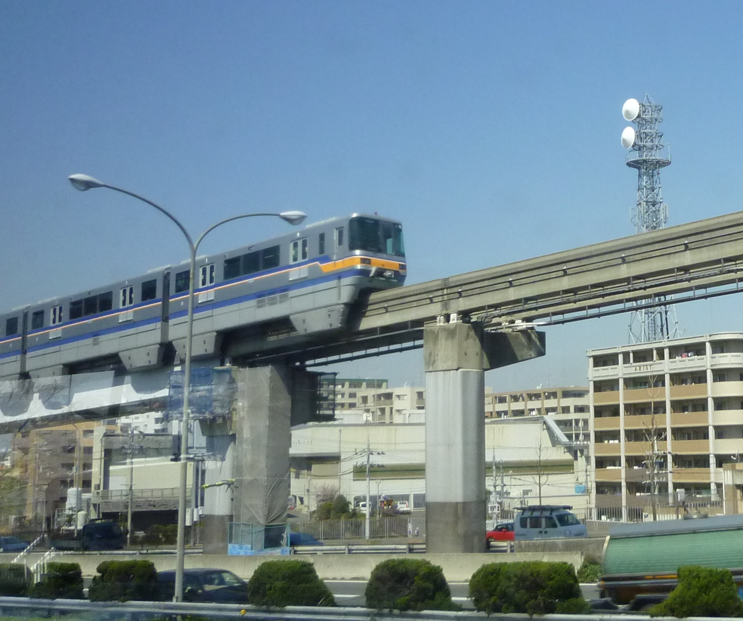 大阪高速鉄道（大阪モノレール）に在籍する新型車両、2000系の最新車両 (Osaka Monorail new 2000 series)